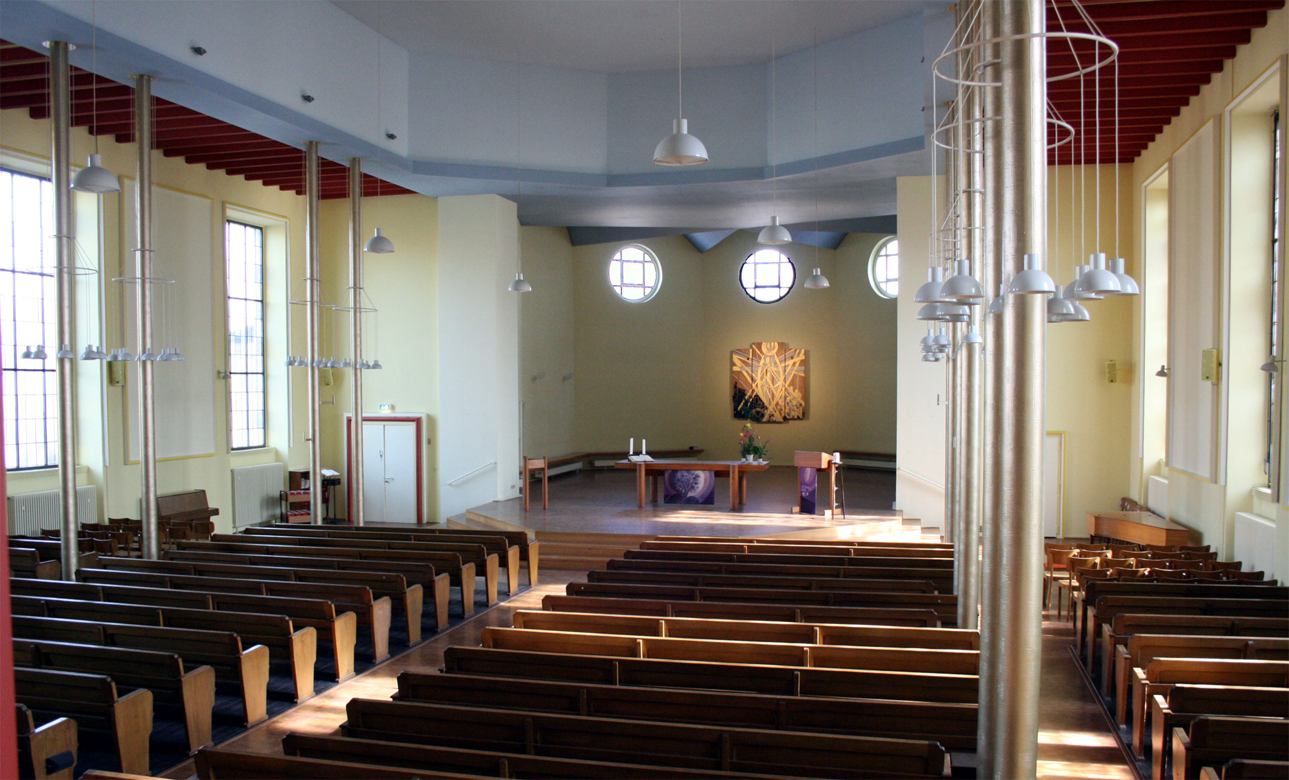 Lukaskirche Ffm Innenraum 1